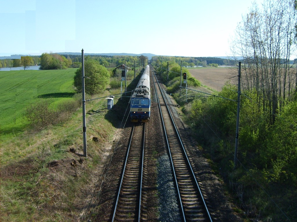 Kařez, okres Rokycany. Trať 170 mezi stanicemi Zbiroh a Kařízek.